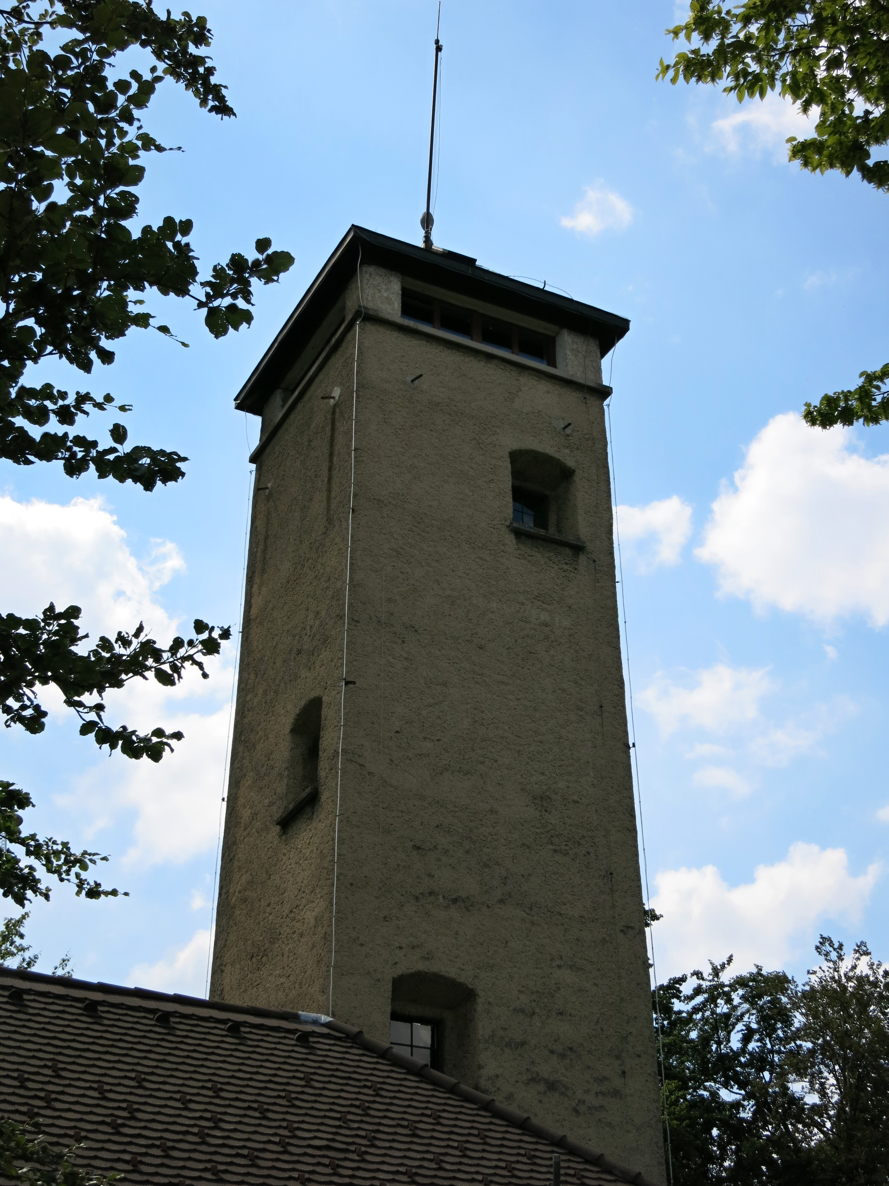 Sonnenbergturm